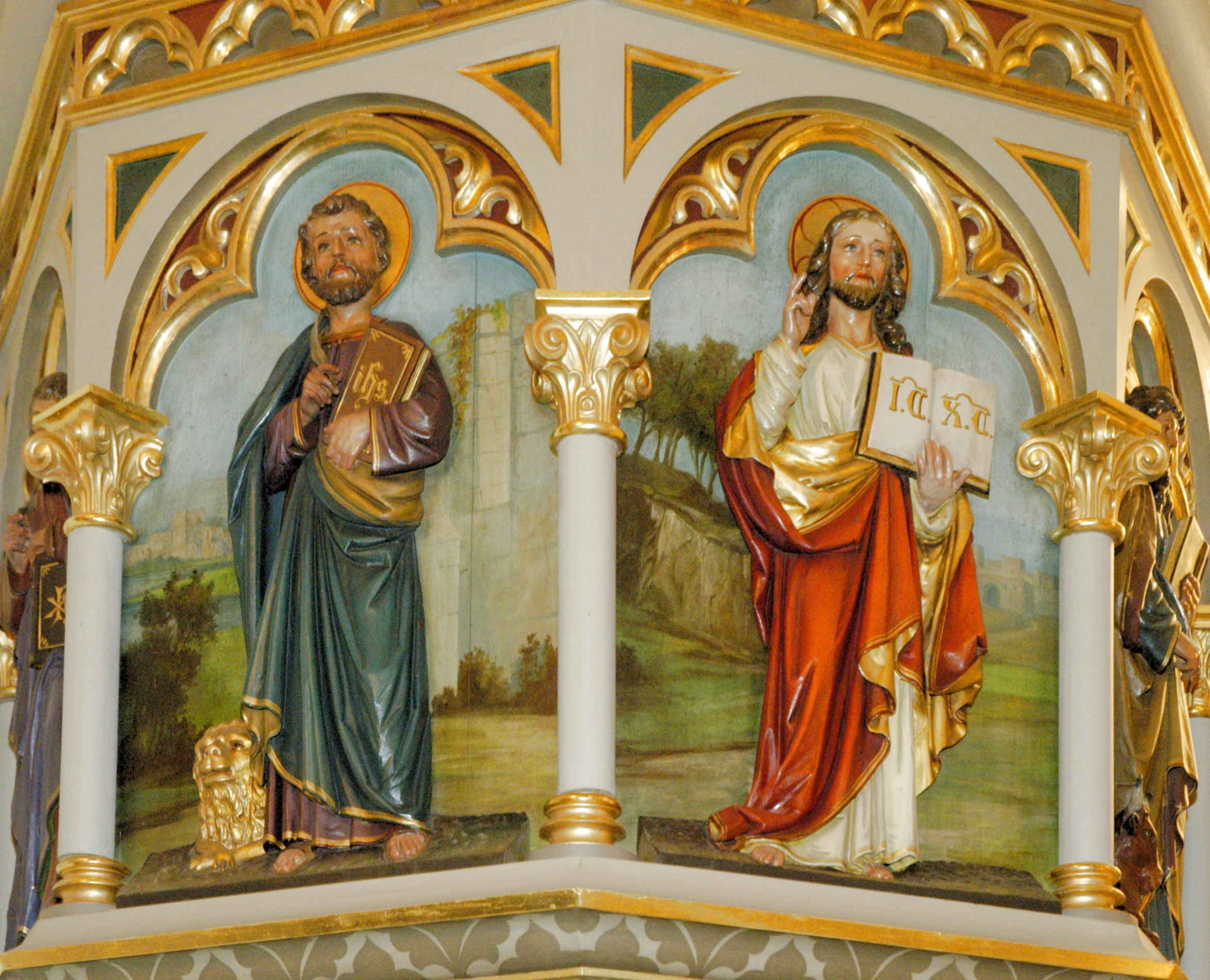 Kath. Pfarrkirche, hll. Peter und Paul Detail der Kanzel